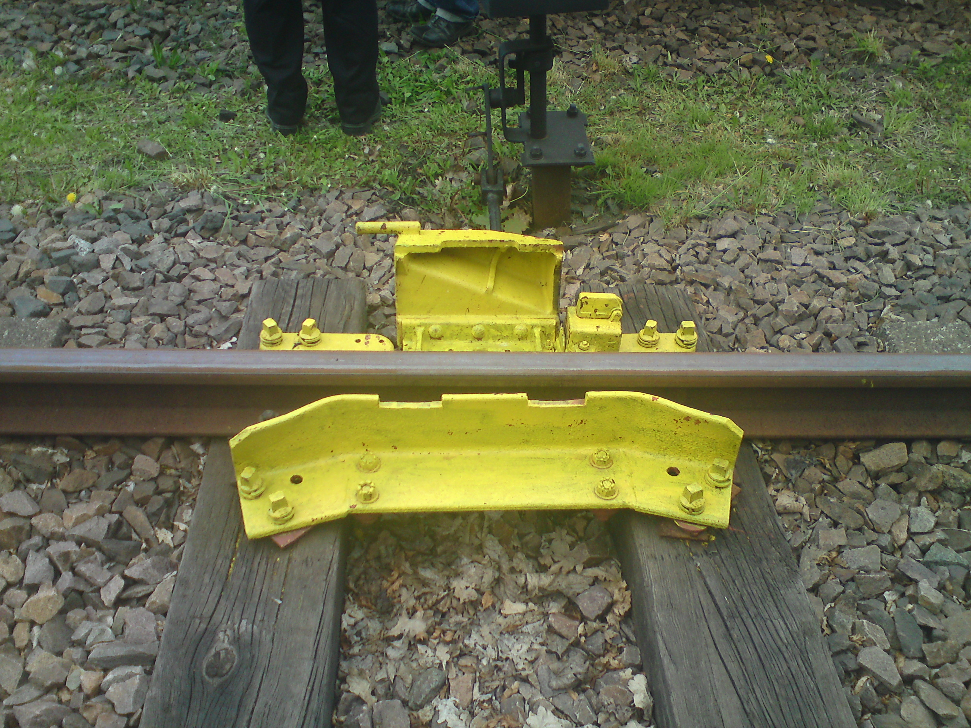 Gleissperre auf dem Gelände des Heizhauses in Löbau.